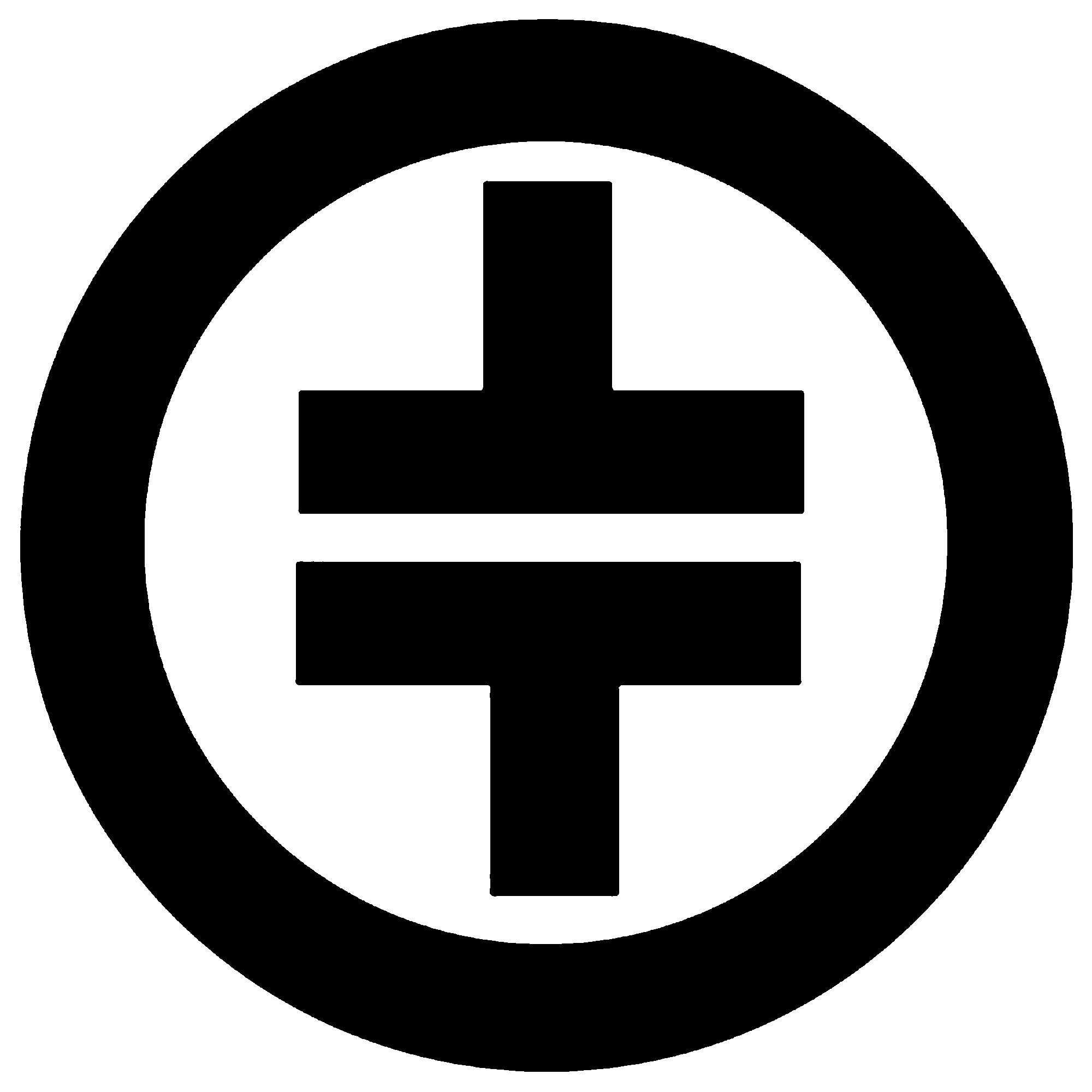 Logo del gruppo musicale Take That